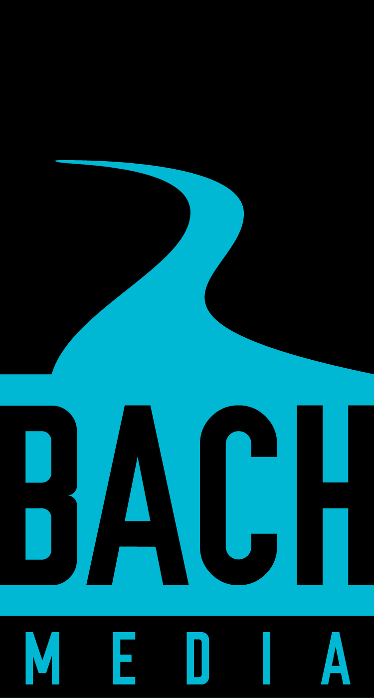 Logo de Bach Media